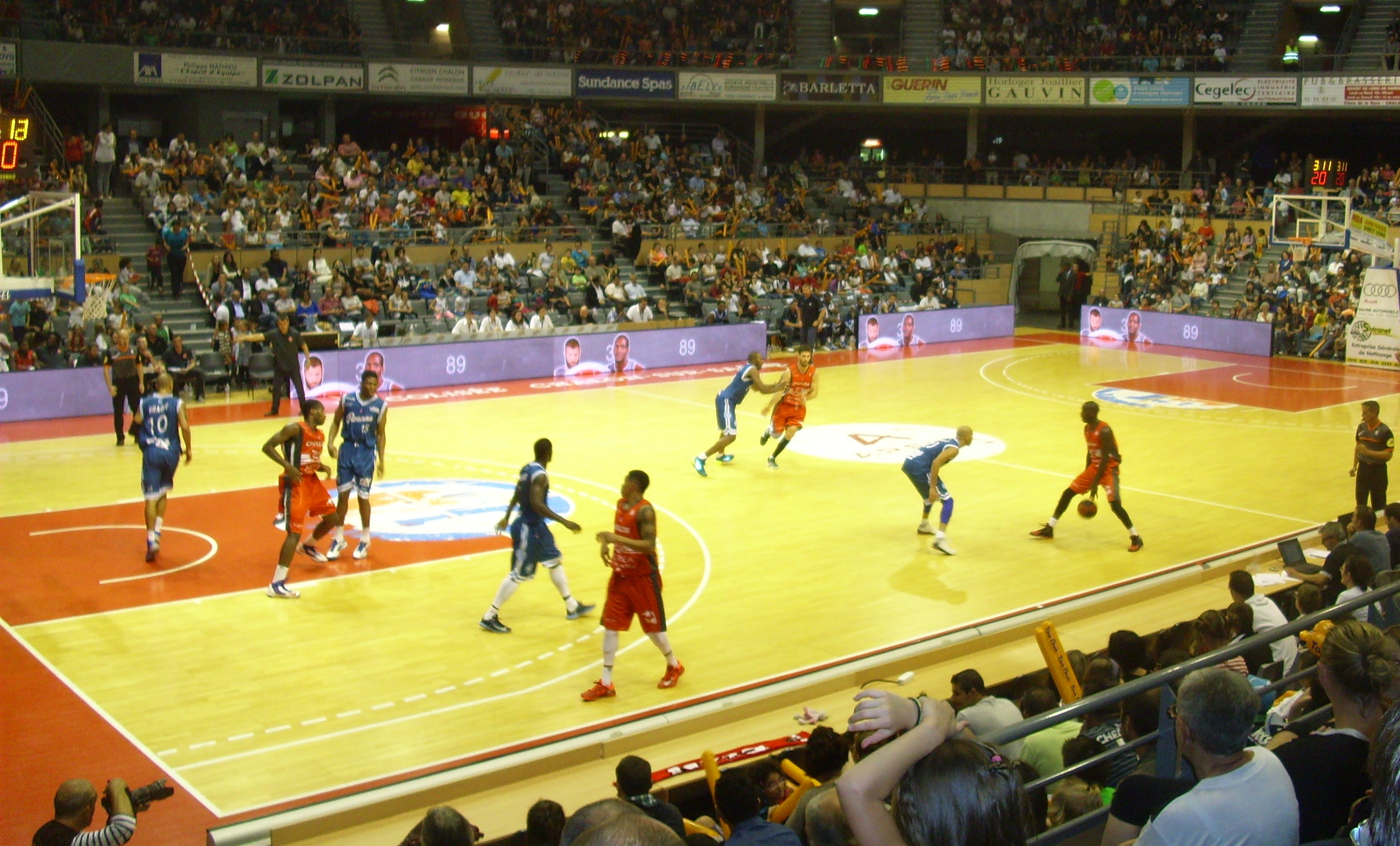 Match amical entre l'Elan Chalon et Roanne en septembre 2013